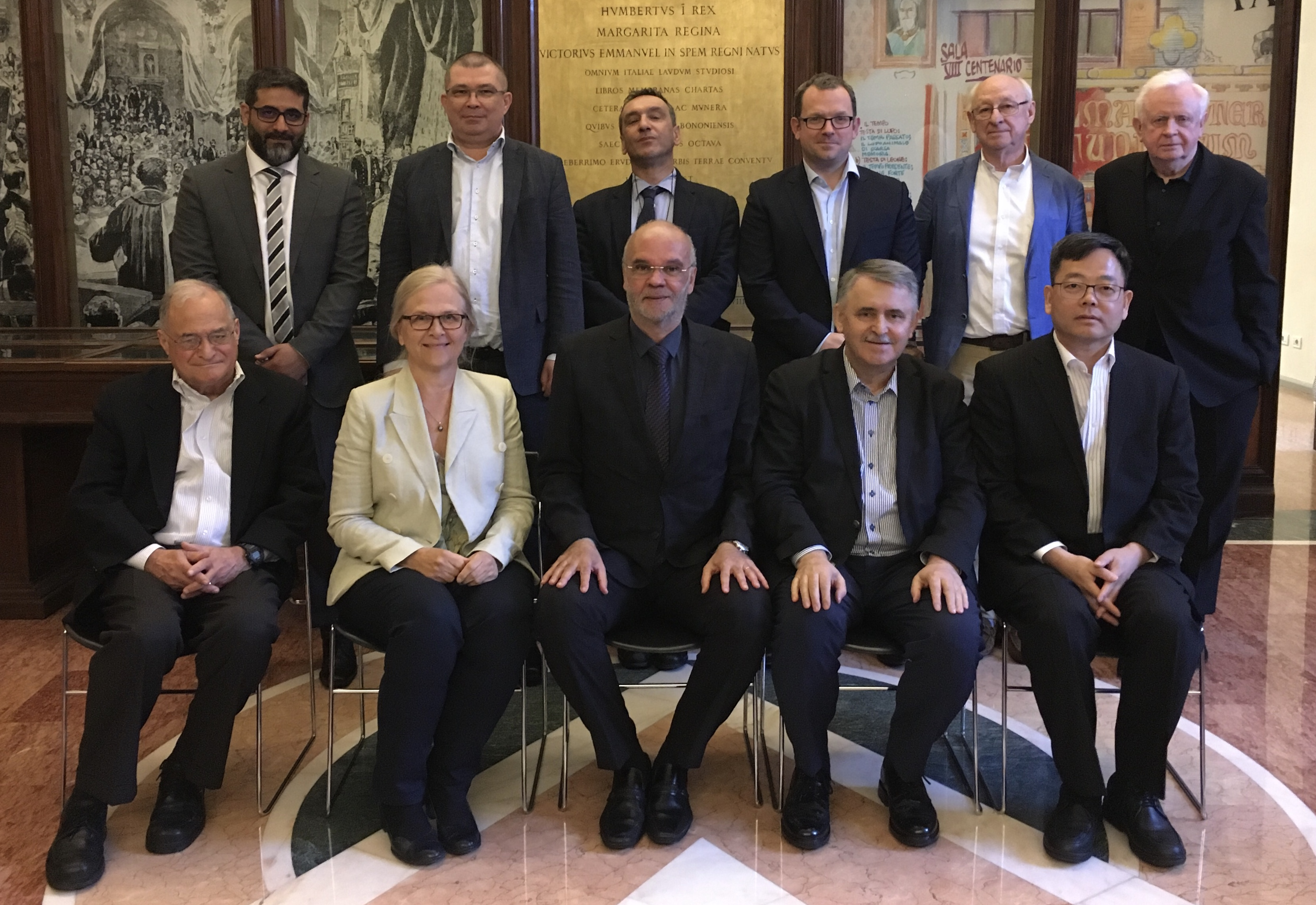 IREG EXECUTIVE Committee 2019 Bologna